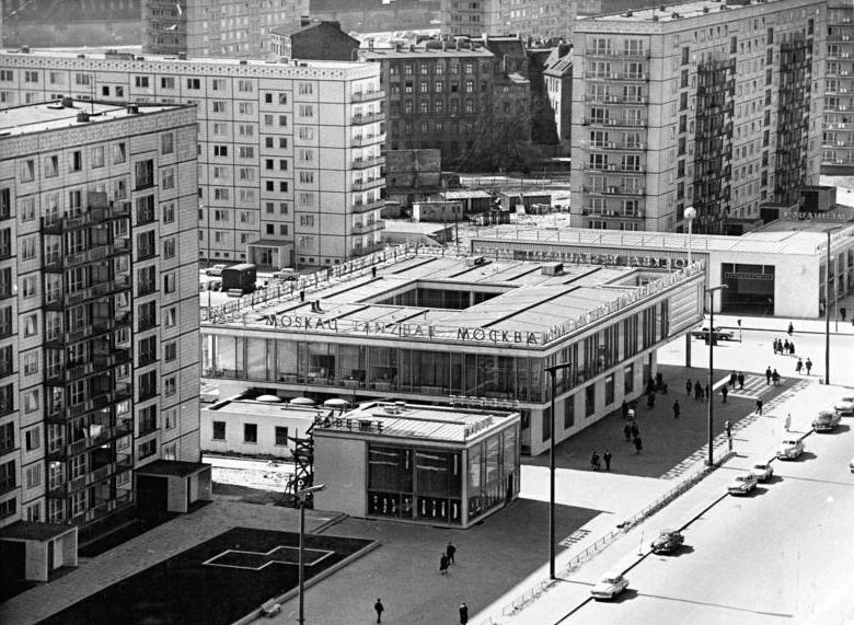 Zentralbild Brüggmann 22.4.1964 Sonderdienst Deutschlandtreffen Berlin, Gastgeberstadt für die Jugend Blick vom "Haus Berlin" auf das Restaurant Moskau und die 10geschossigen Wohnhäuser in Großplattenbauweise in seiner Umgebung.